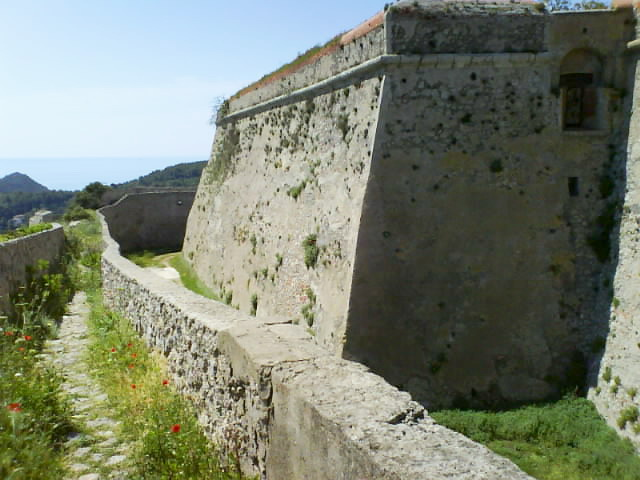 Forte Filippo (Porto Ercole) - Bastione ovest